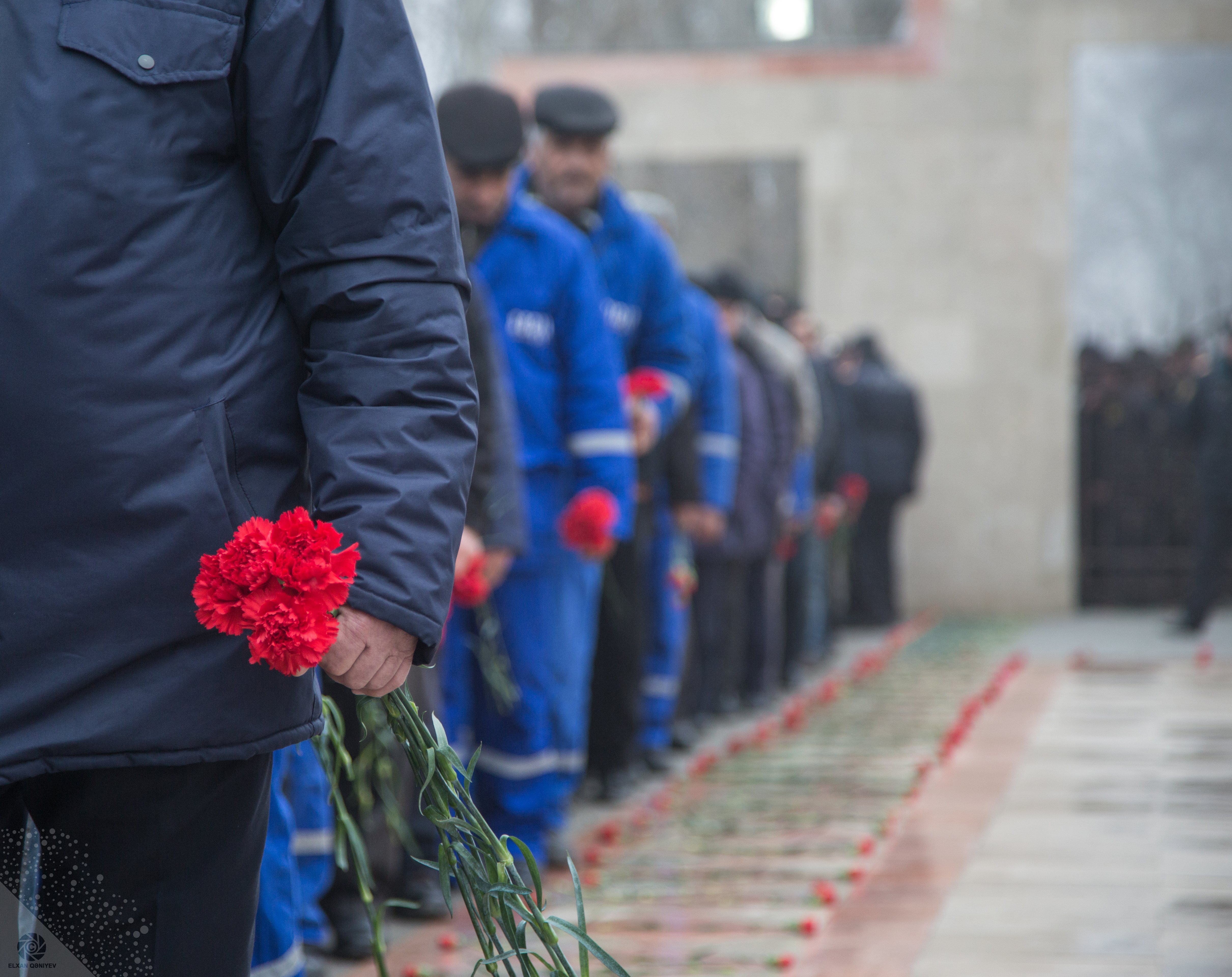 20 yanvar, January, Baku, Azerbiajan, Bloody January